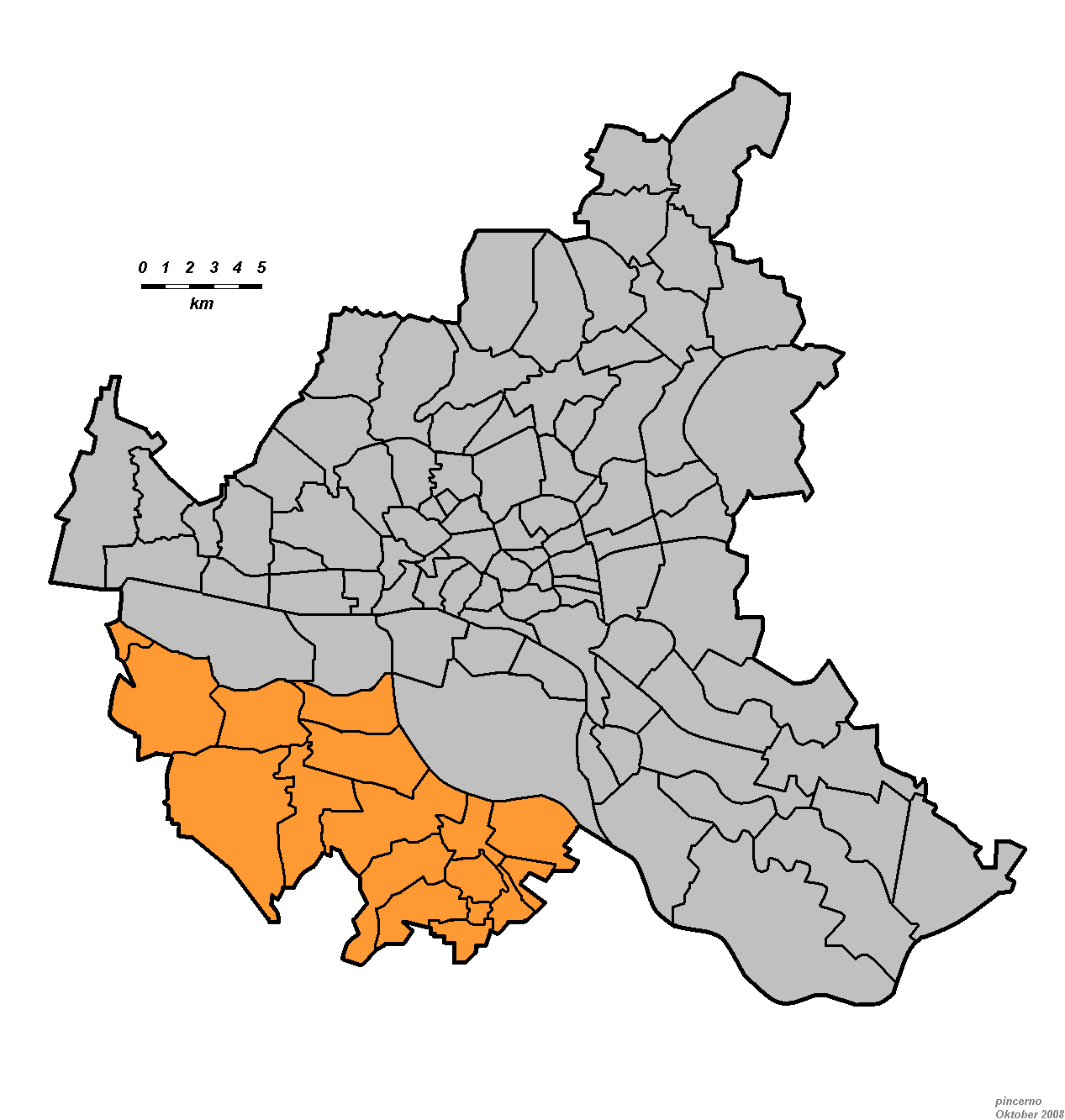 Der Bezirk Harburg in Hamburg.